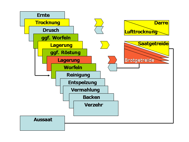 Getreidebehandlung in vorindustrieller Zeit